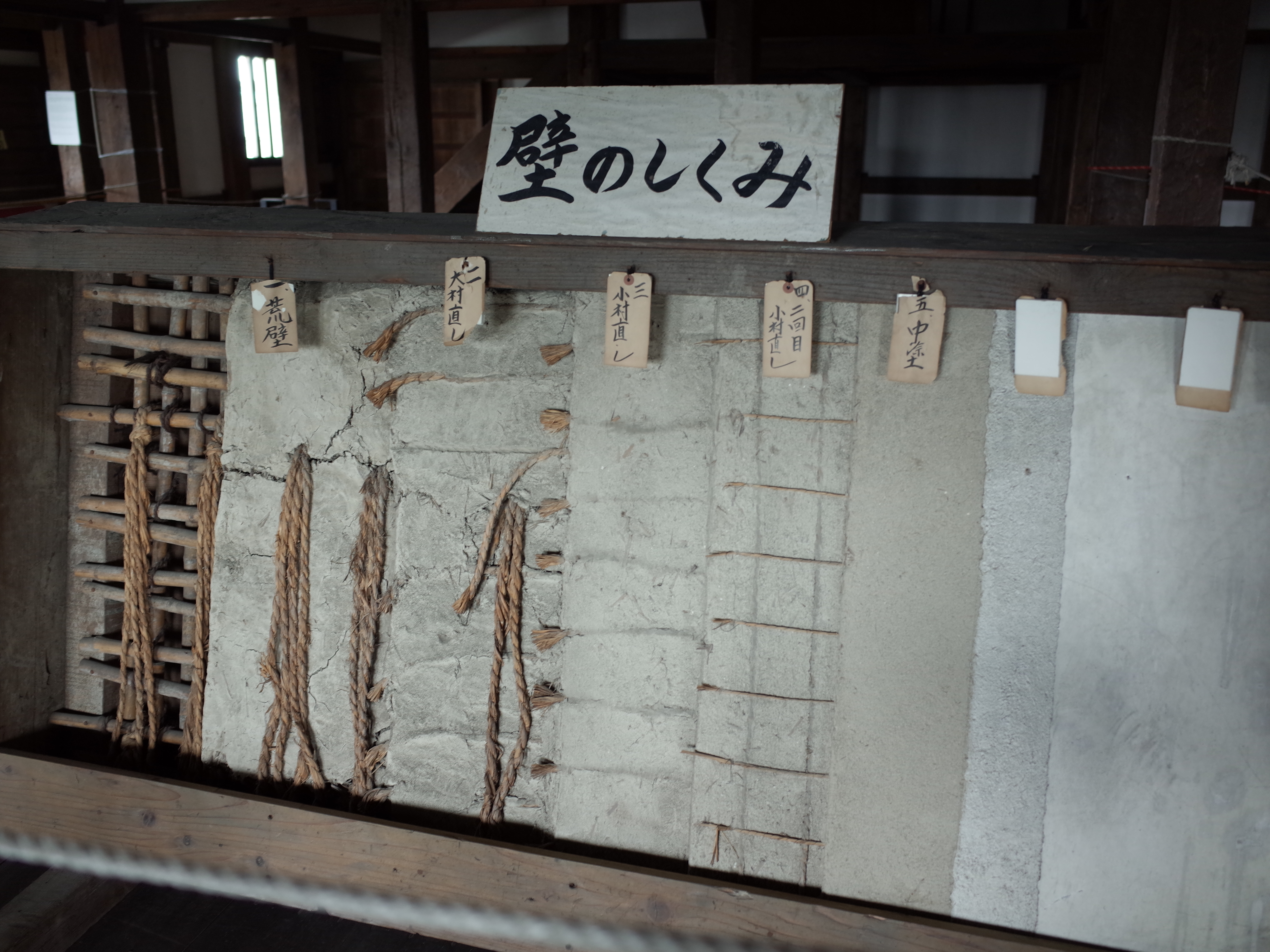 名古屋城 - 西北隅櫓